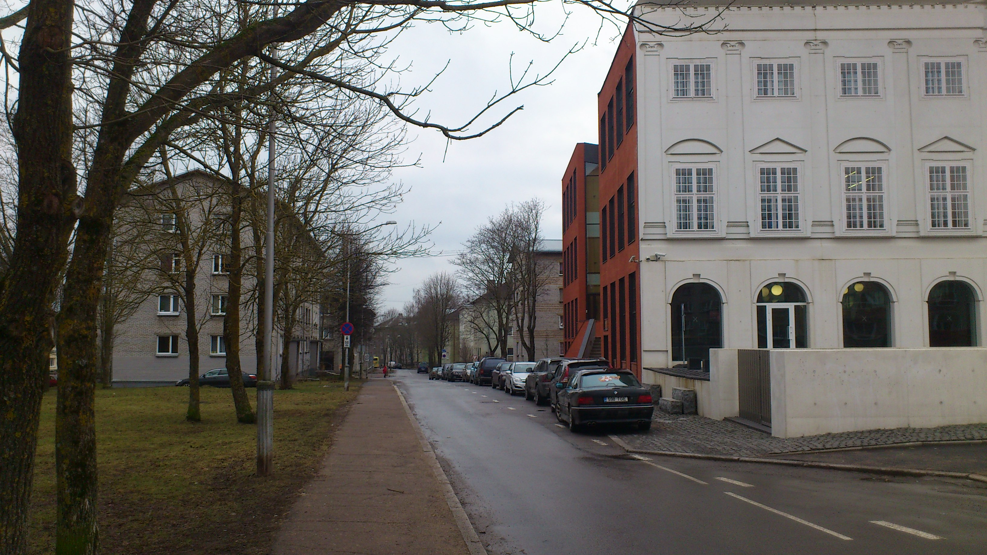 Suur tänav. Vaade Liidija Koidula tänava suunas